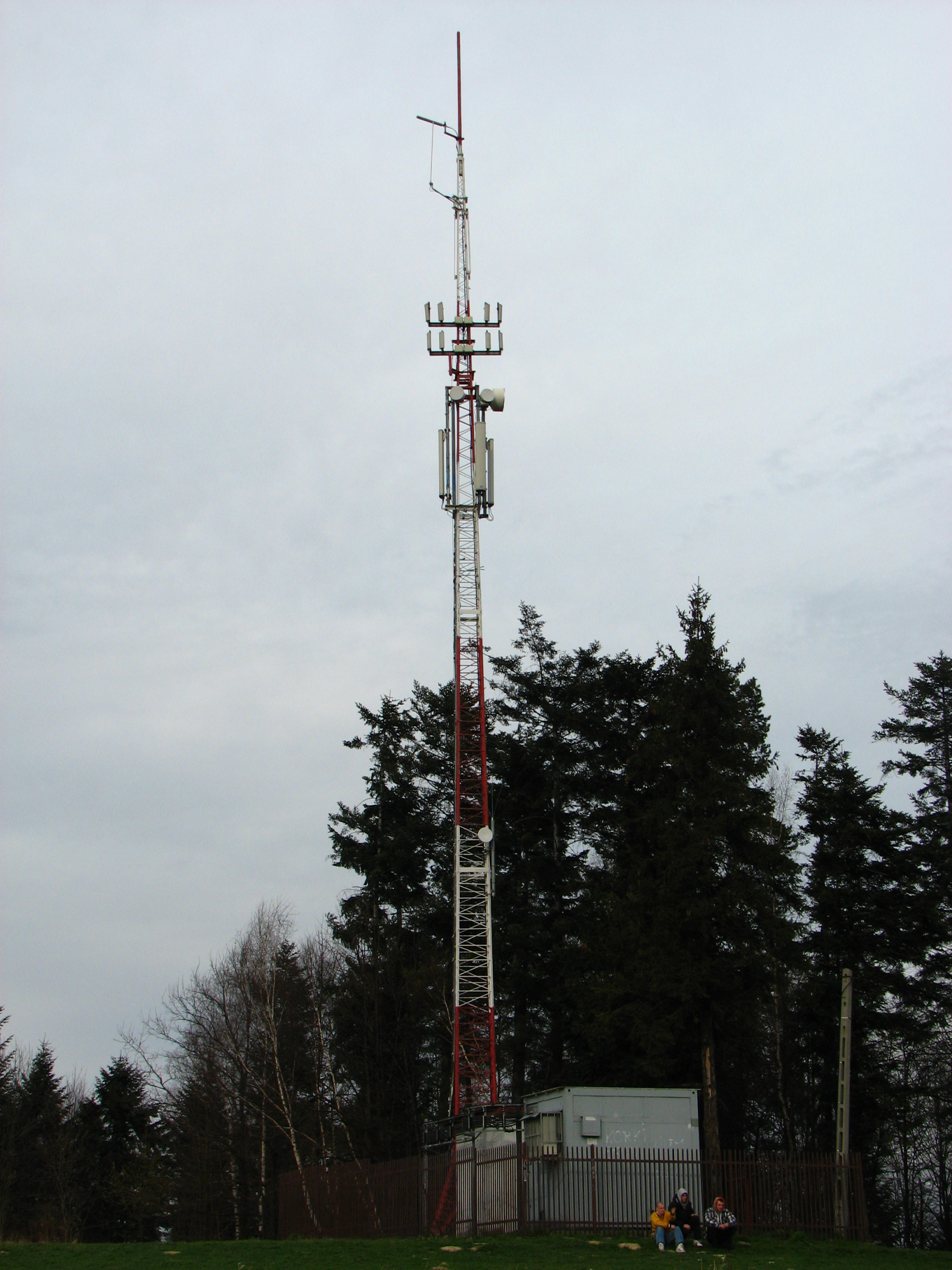 Szczyt Mużeń na Pogórzu Rożnowskim. Masz antenowy na szczycie.